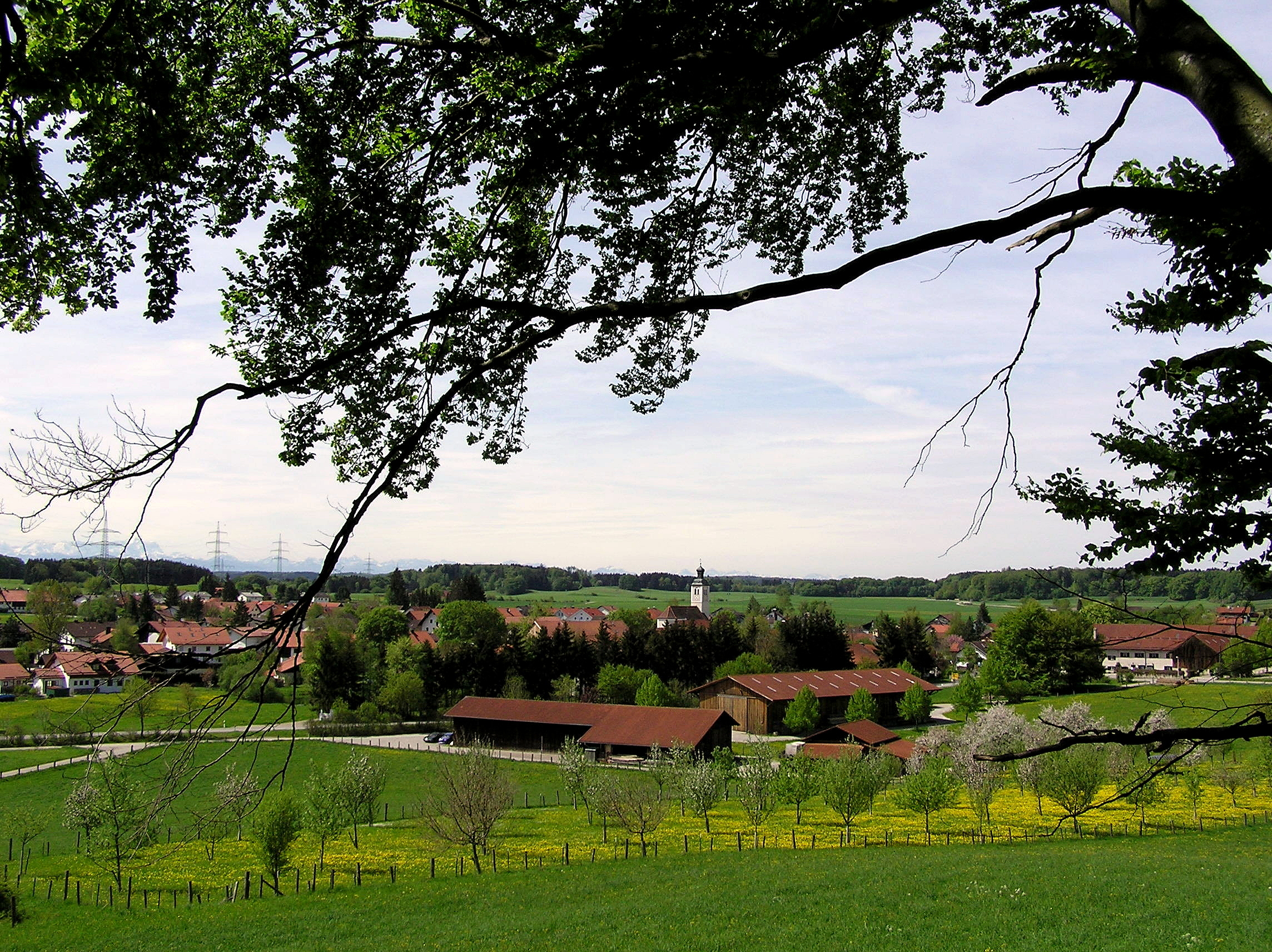 Starnberg, OT Perchting. Blick aus nordöstlicher Richtung auf das Pfarrdorf Perchting.